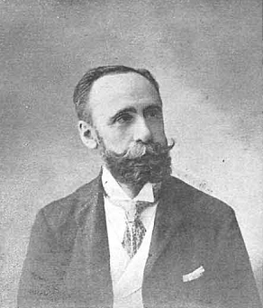 Retrato de Luis de Landecho, obra de Manuel Compañy, recogido en la revista española La Ilustración Española y Americana.